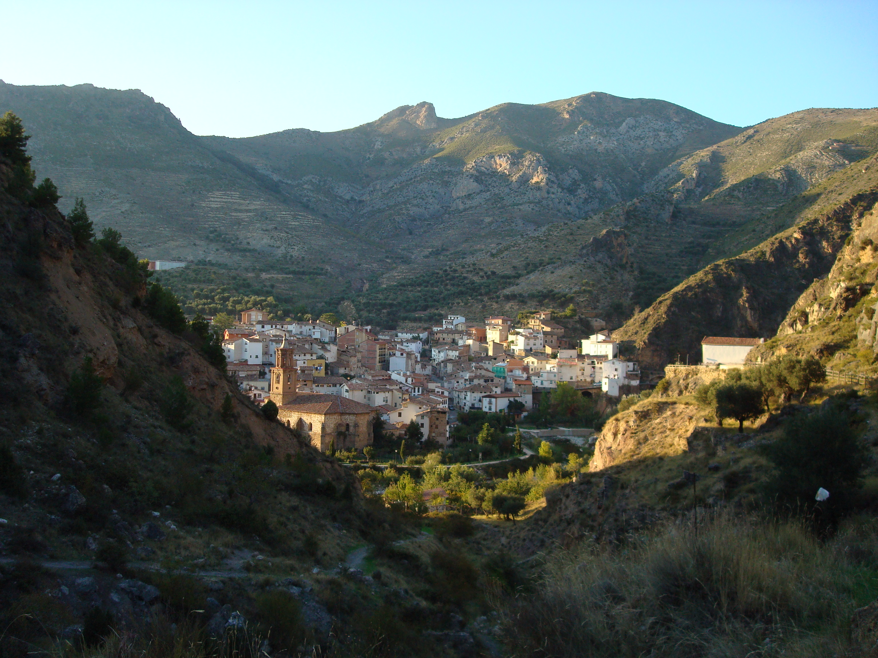 Arnedillo - 003